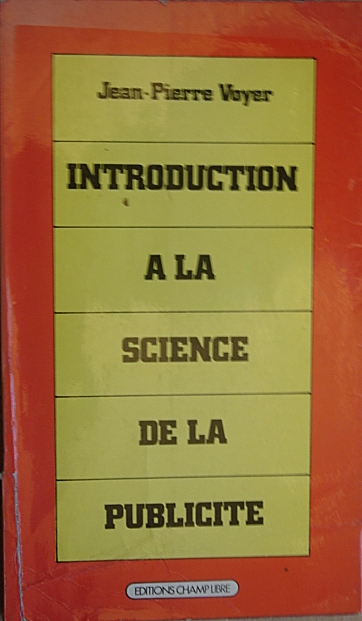 Couverture de la première édition de: Introduction à la science de la publicité, de Jean-Pierre Voyer